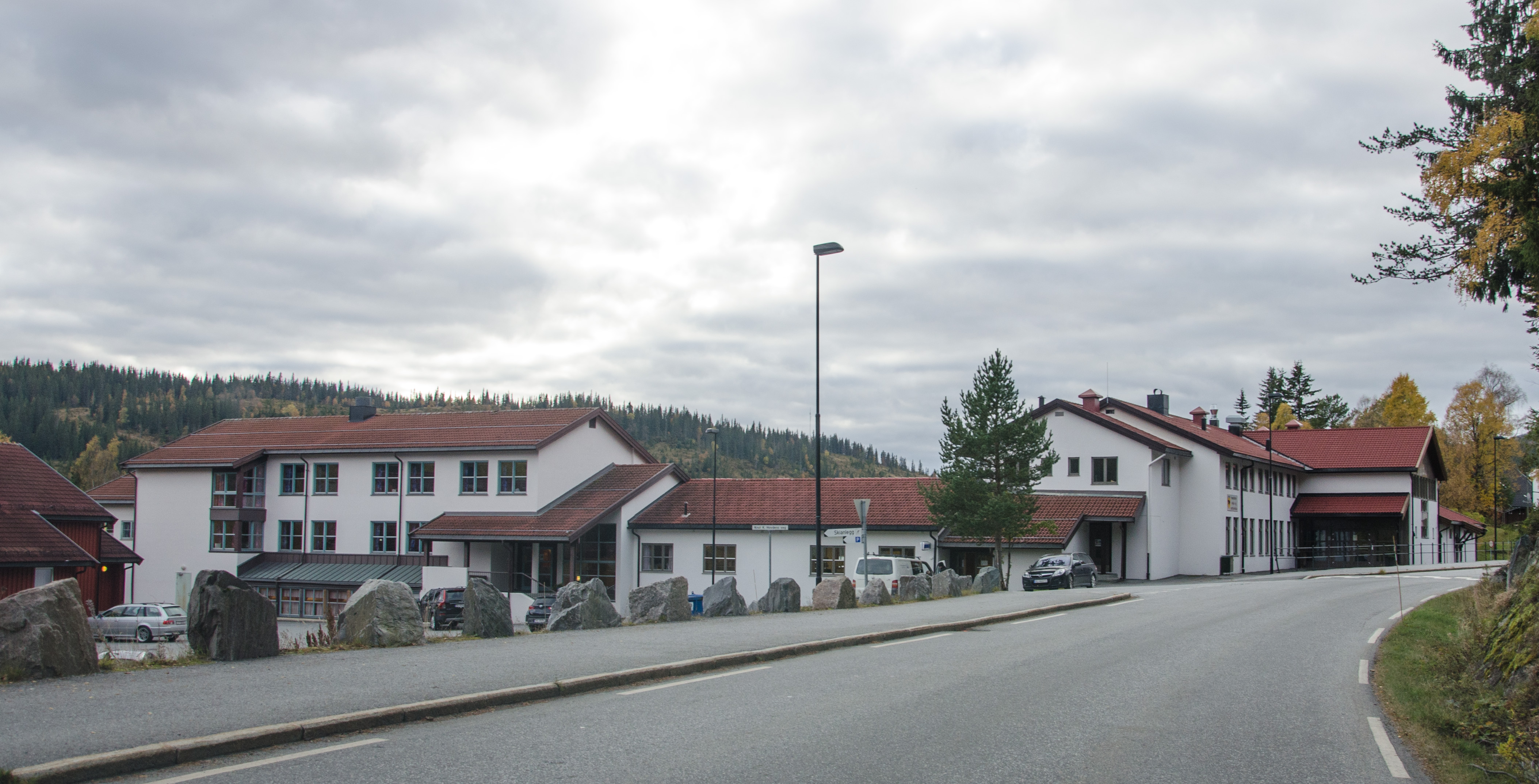 Høydalsmo skole og samfunnshus